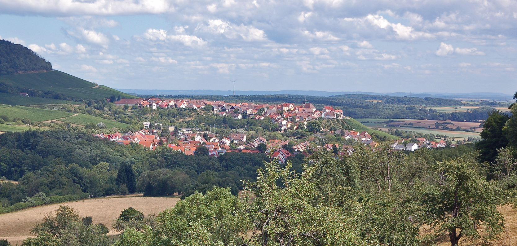 Hohenhaslach vom Plateau der Burg Bromberg. Im Hintergrund Windkraftanlage Ingersheim.